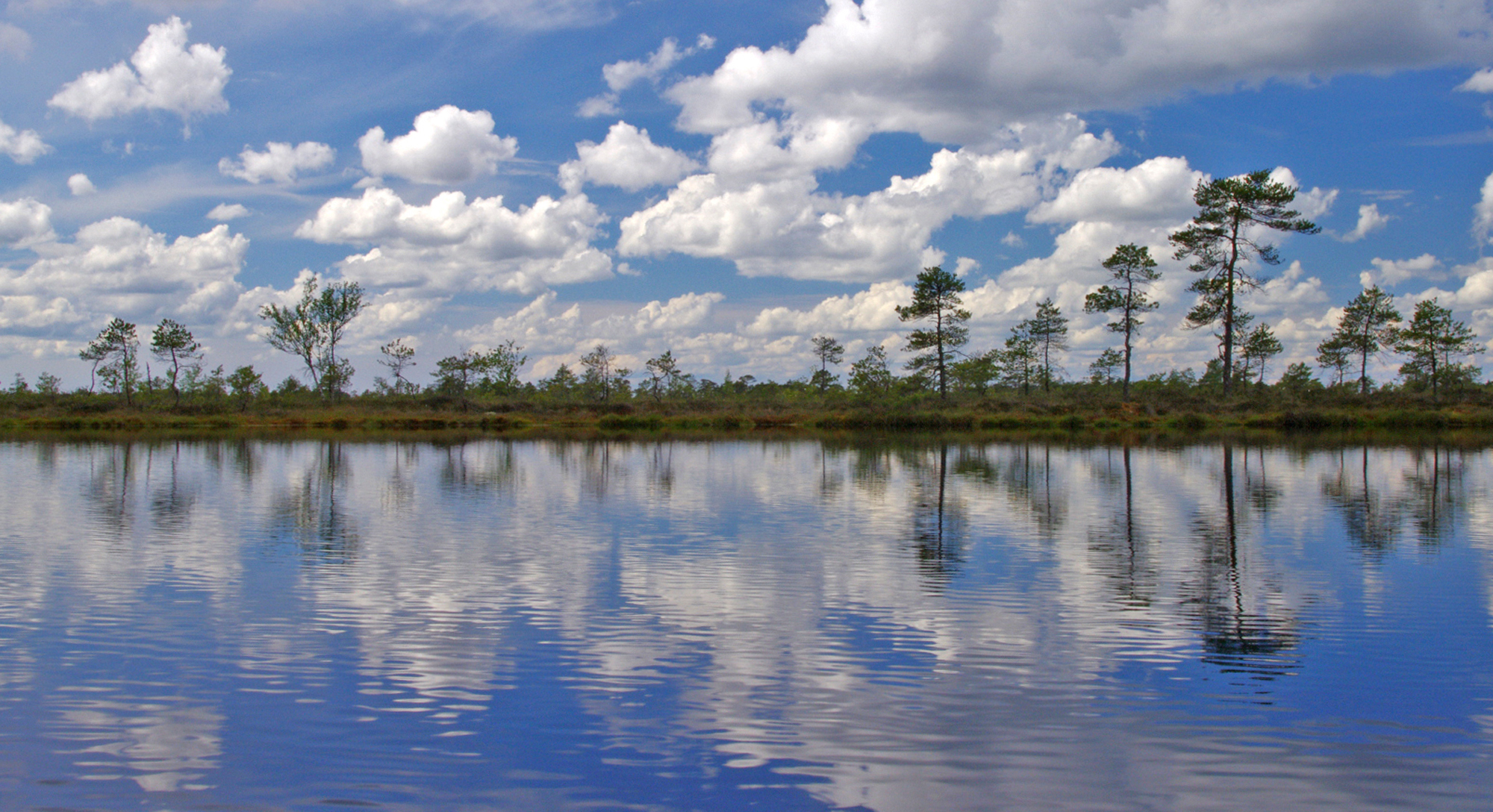 Keskpäevane rabalaugas Kuresoos Soomaal, Soomaa rahvuspark